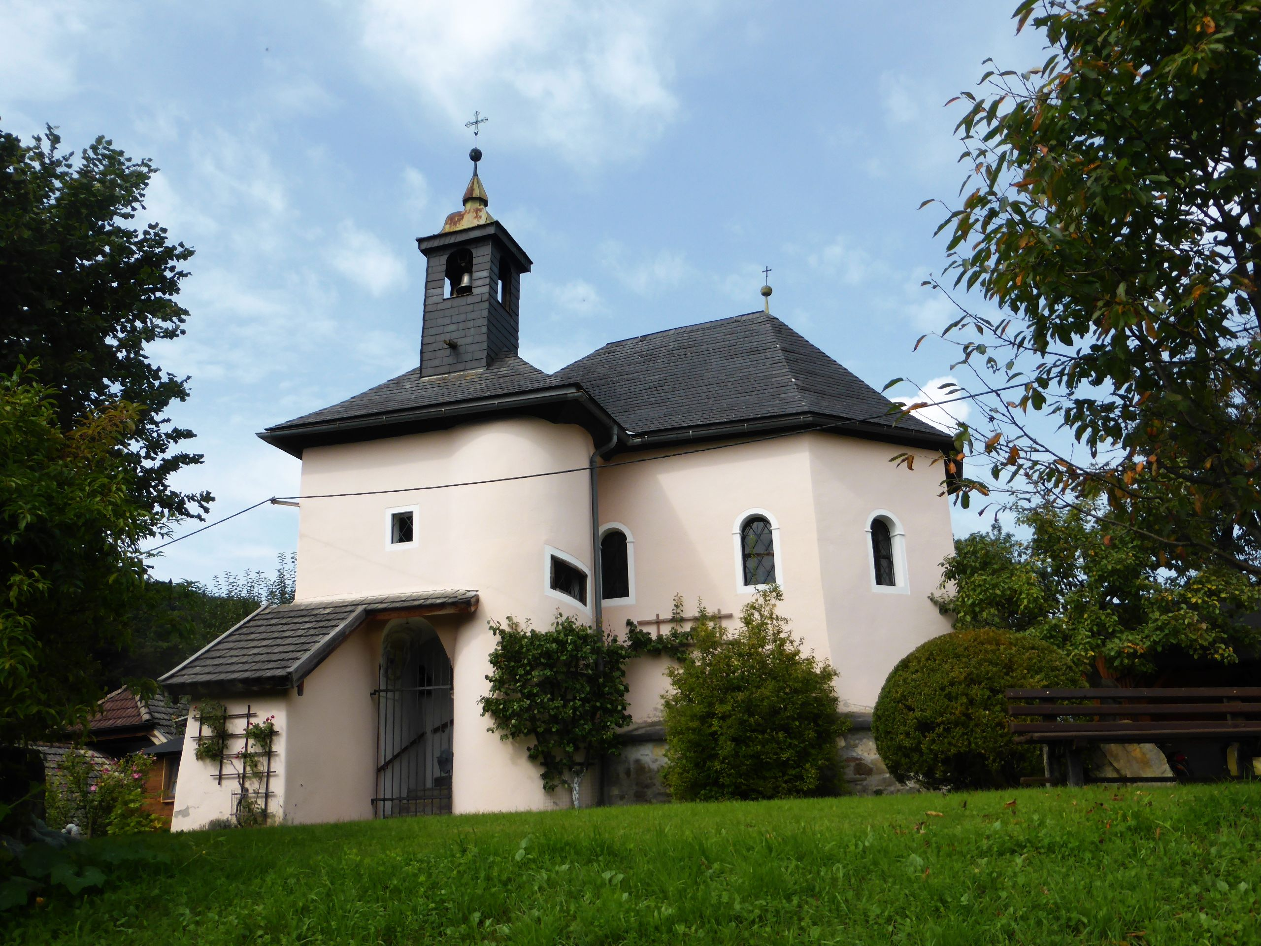 Gesamtanlage, Ehemaliges Schloss Radeck mit Schlosskapelle